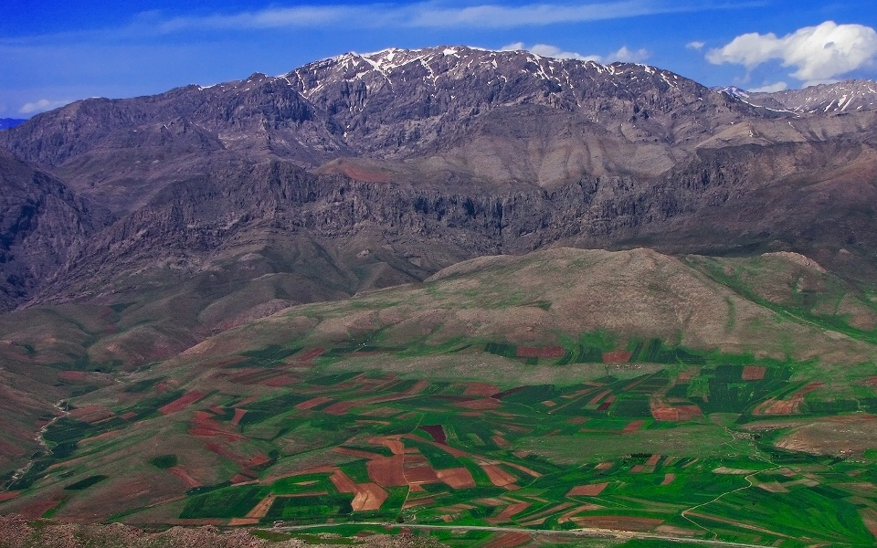 تصویر قله ولاش که از یک قله مجاور گرفته شده است. تاریخ تصویر برداری: 7 اریبهشت 1389 به وسیله نورمحمد سبزیان